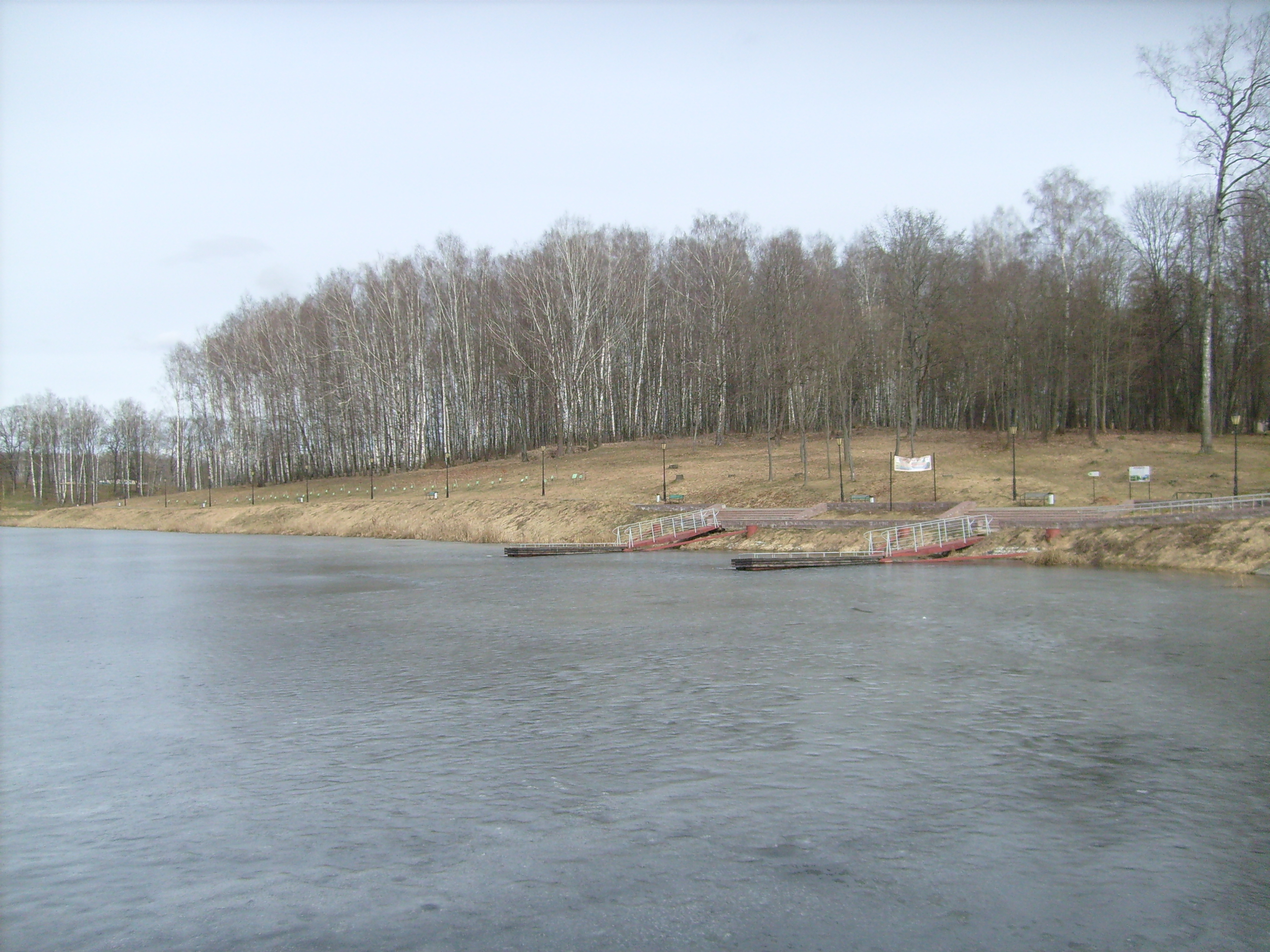 Белорусская сельскохозяйственная академия. Нижнее озеро